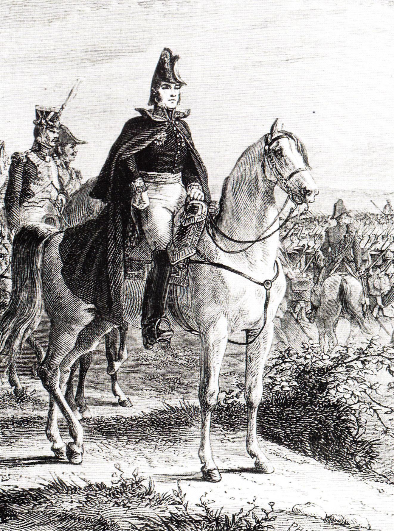 Le général Gabriel Jean Joseph Molitor (1770-1849)